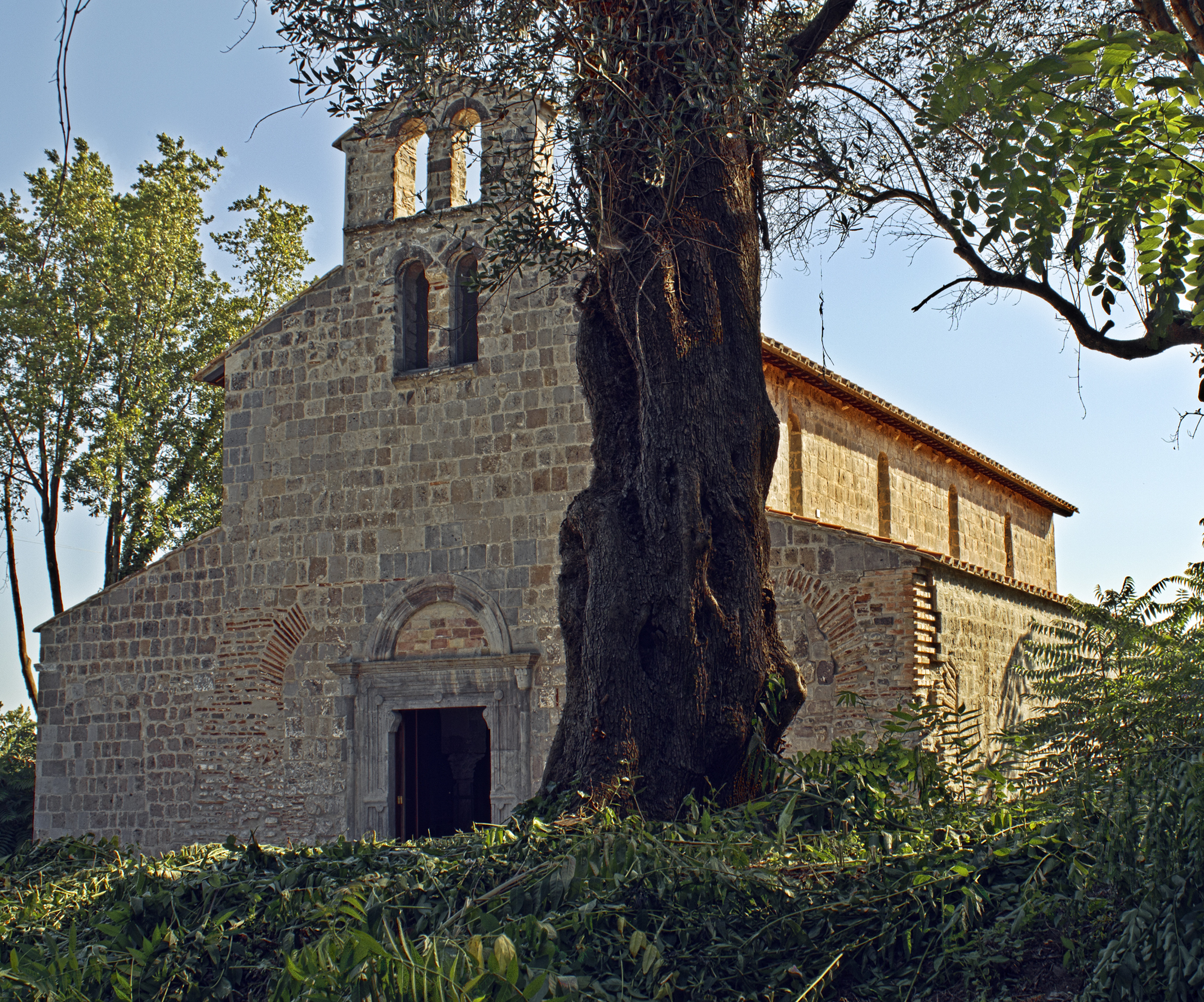 Facciata di S.Maria in Foro Claudio, a cura del Circolo socio-culturale Caleno